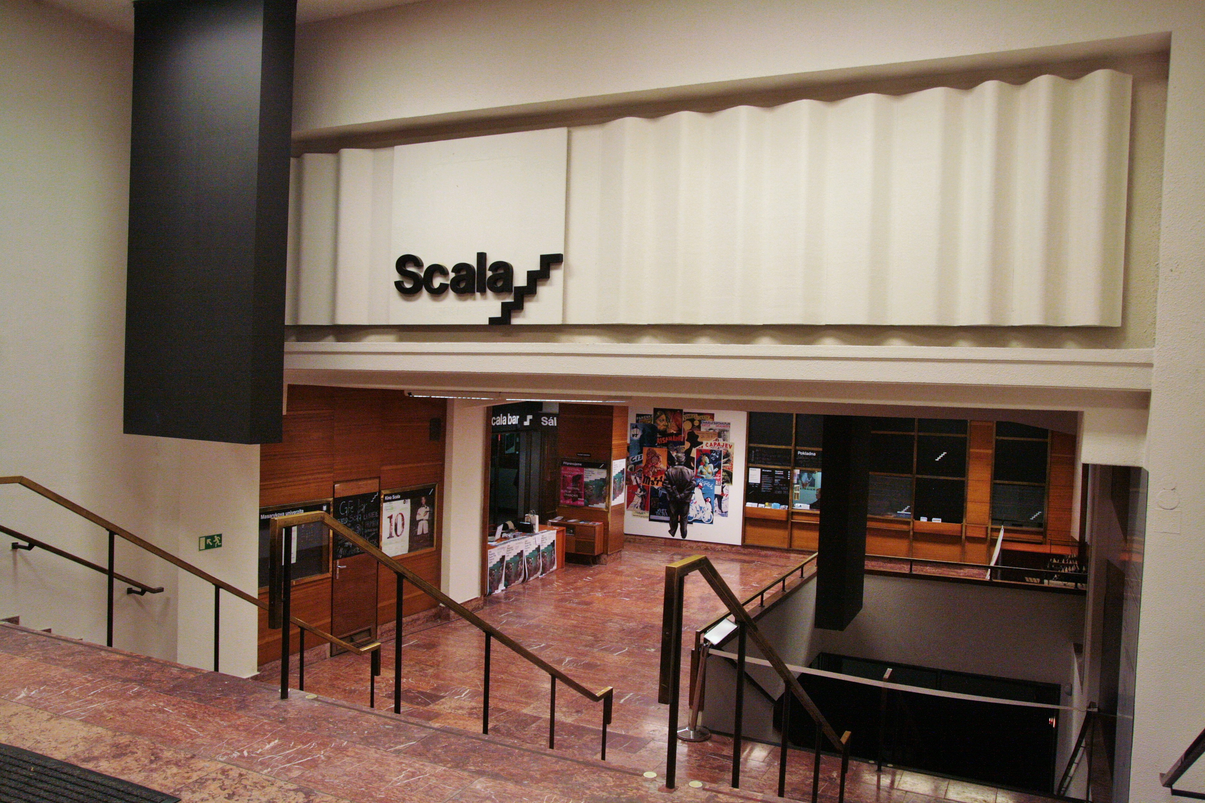 Výzdoba vstupního schodiště po úpravách, které předcházely obnovení provozu kina na podzim 2013.